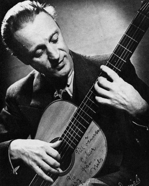 Banjo-Lasse